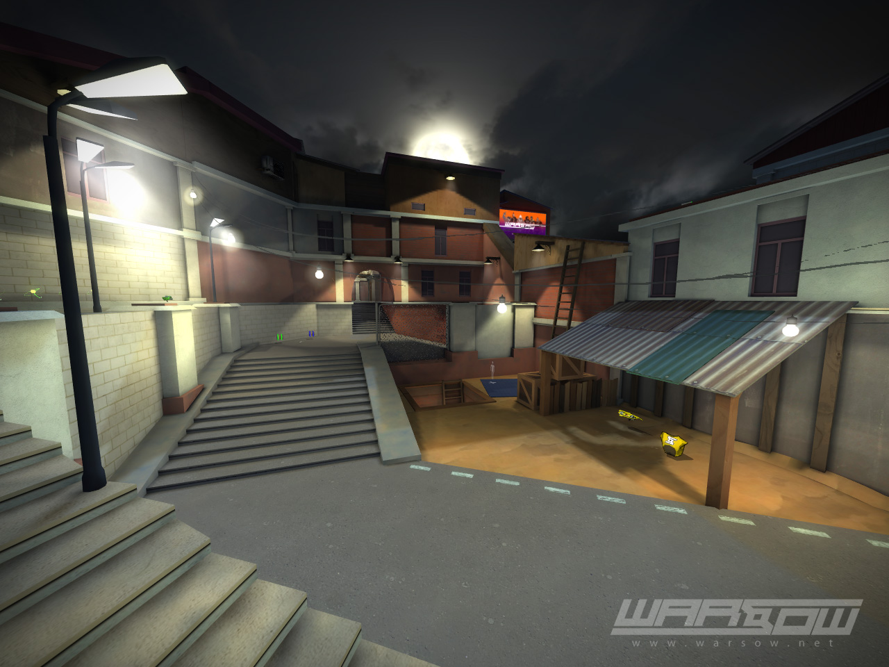 Взято с , по лицензии указанной внизу страницы